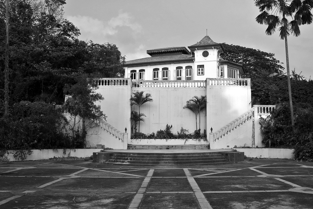 Alkaff Mansion, Singapore